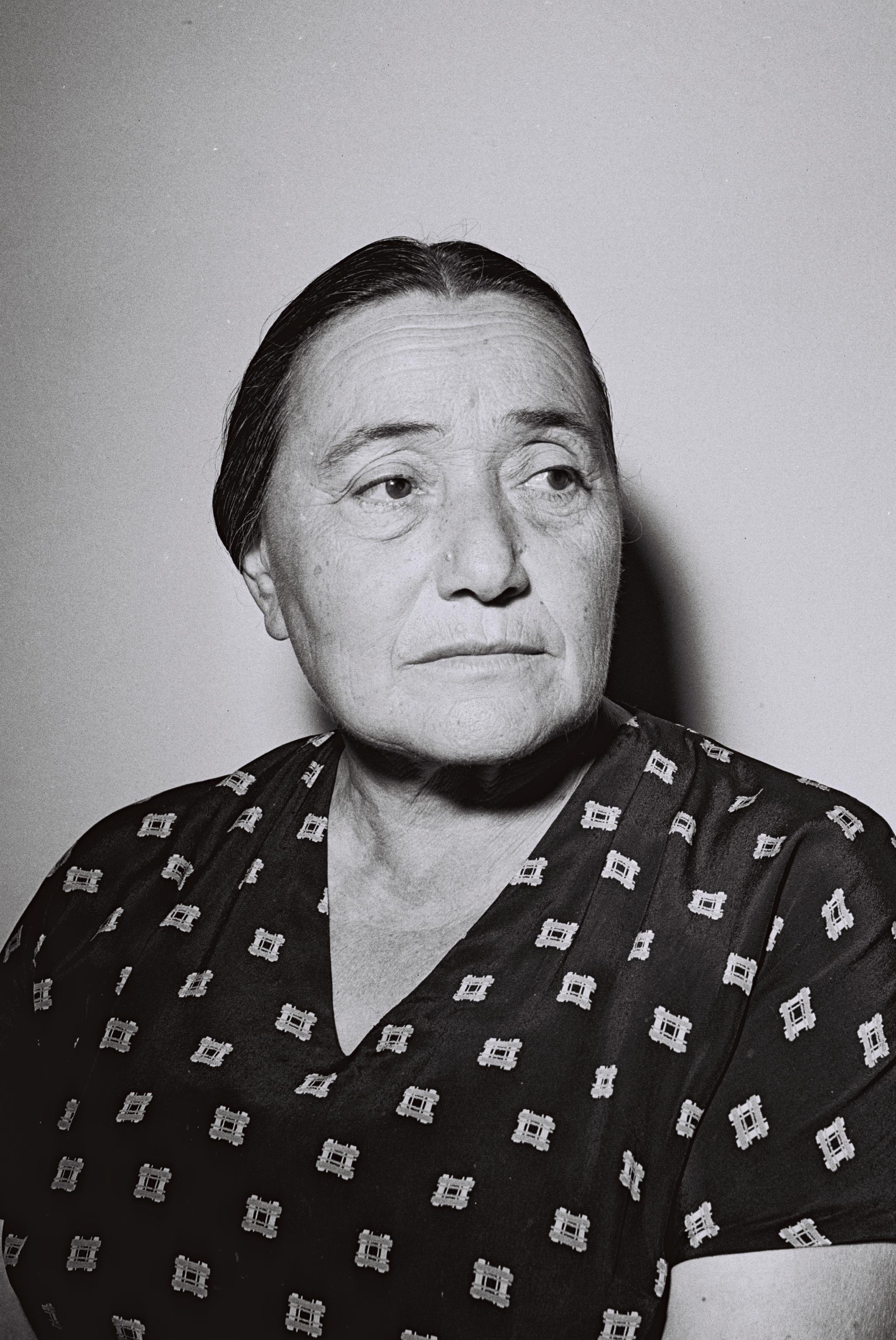 חנה לוין, הציונים הכלליים, היתה ראש עיריית ראשון לציון